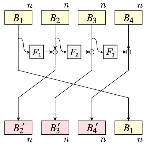 רשת פייסטל כללית מסוג 3